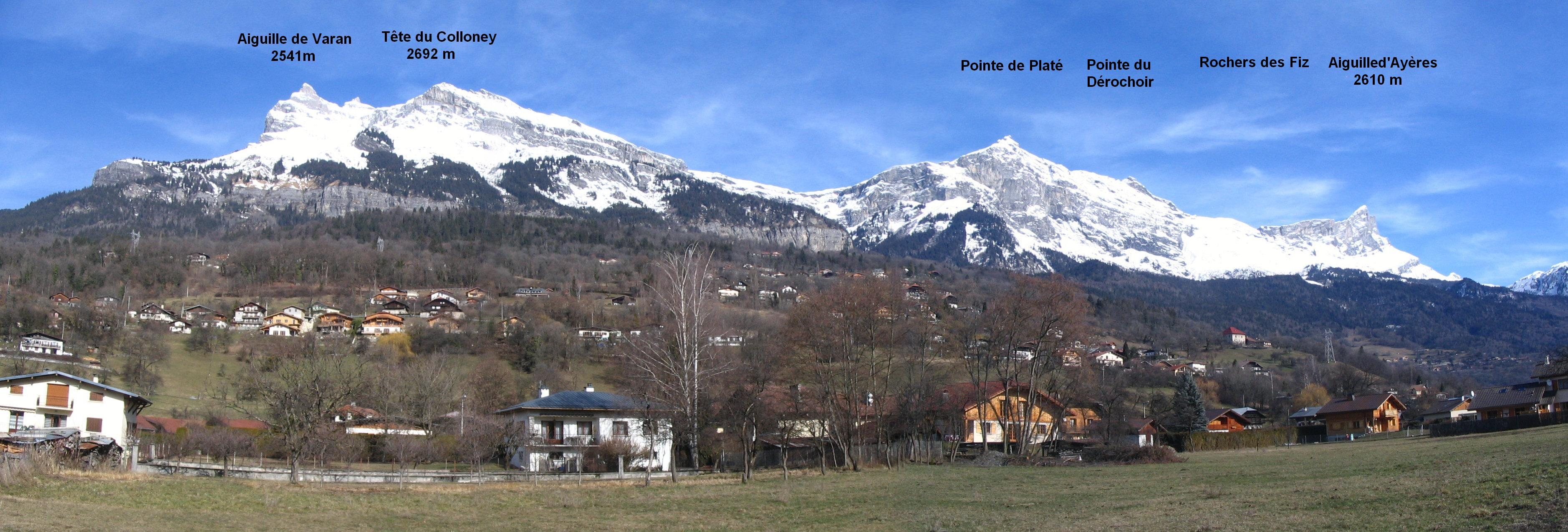 Massif du Faucigny depuis Passy - Massif du Giffre - Haute savoie